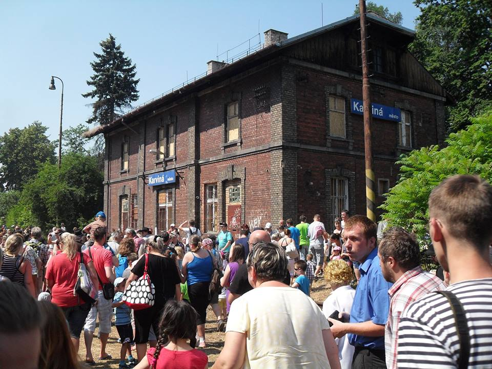 Nádraží Karviná město